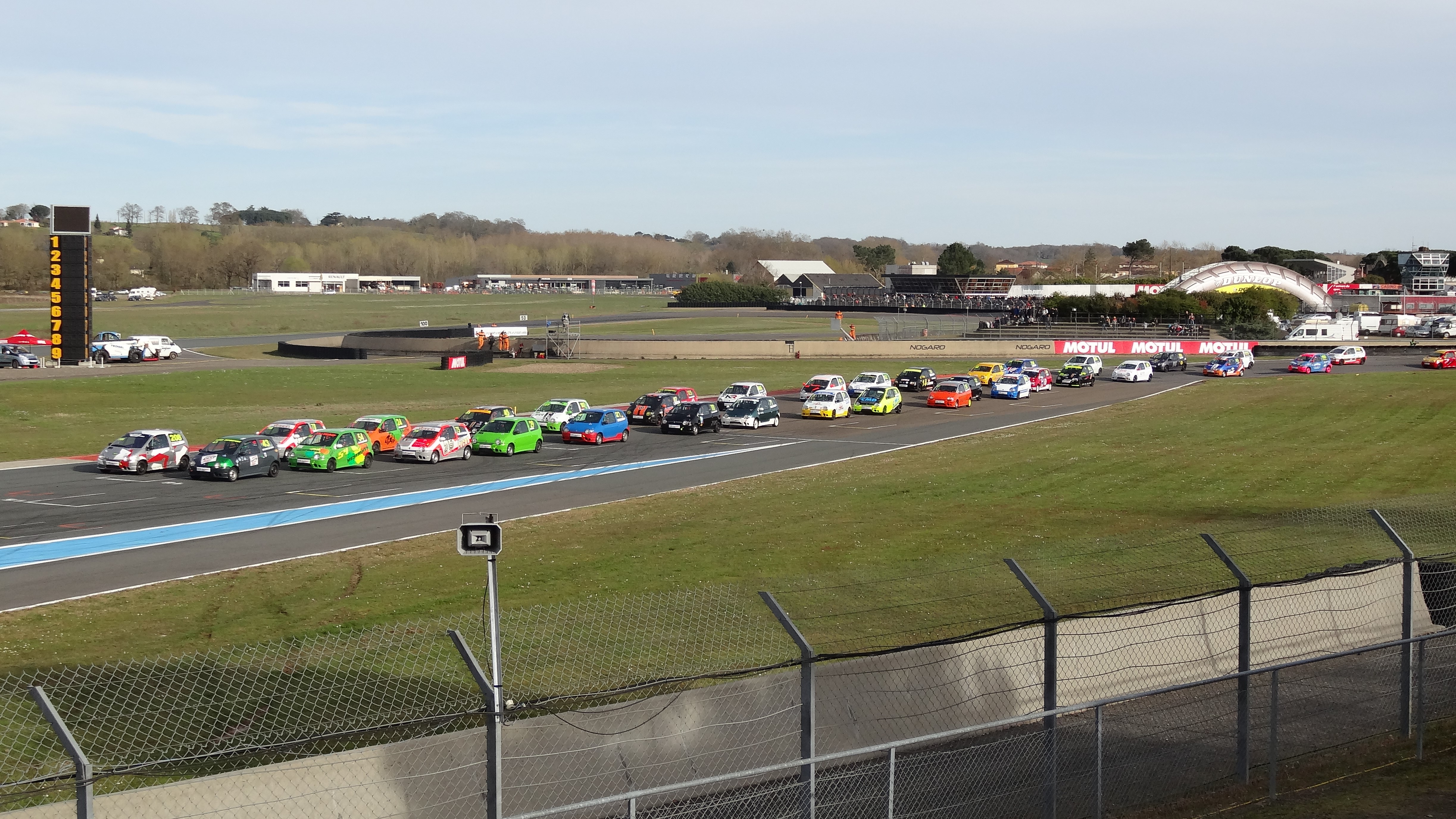 51e Coupes de Pâques (sport automobile), sur le Circuit Paul Armagnac à Nogaro (Gers) : Twin Cup.